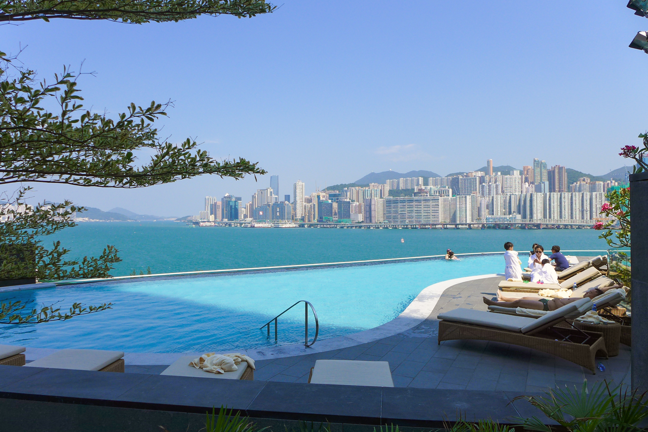 Kerry Hotel Hong Kong